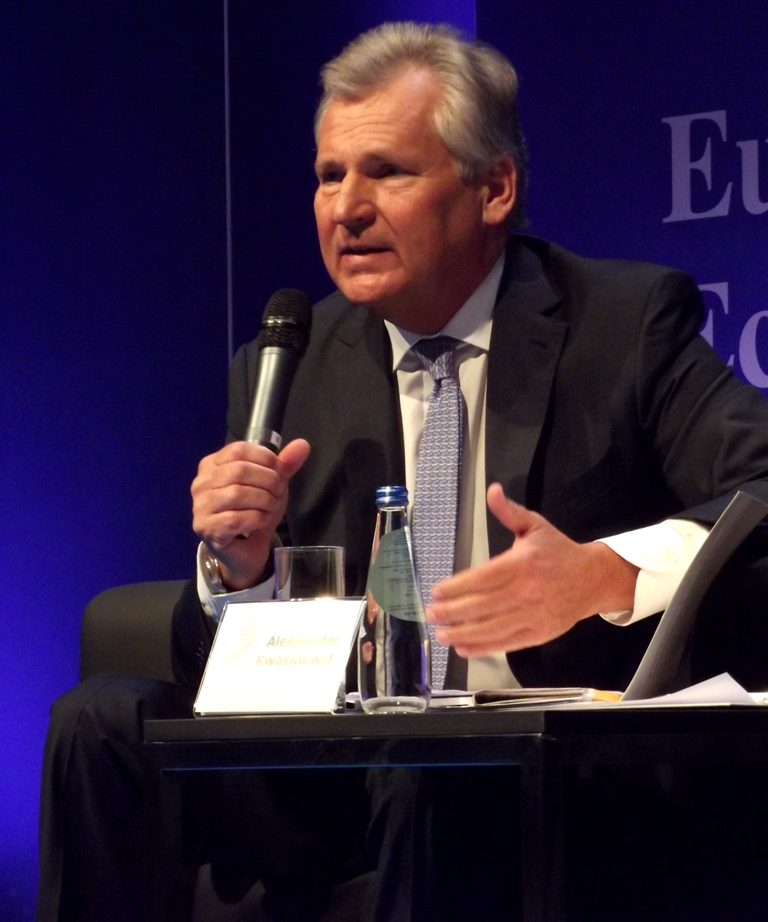 Aleksander Kwaśniewski na Europejskim Kongresie Gospodarczym w 2013 roku.